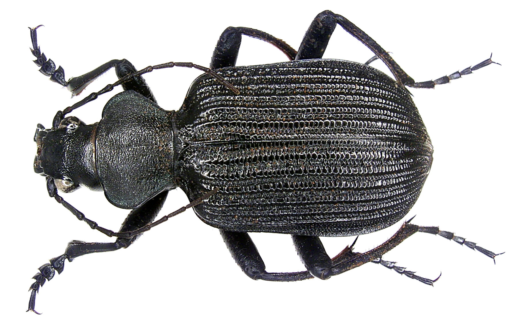 Familie: Carabidae Groesse: 30 mm Fundort: Kenia, Tsavo National Park leg. U.Schmidt, 1991; det. W.Lorenz Foto: U.Schmidt, 2006